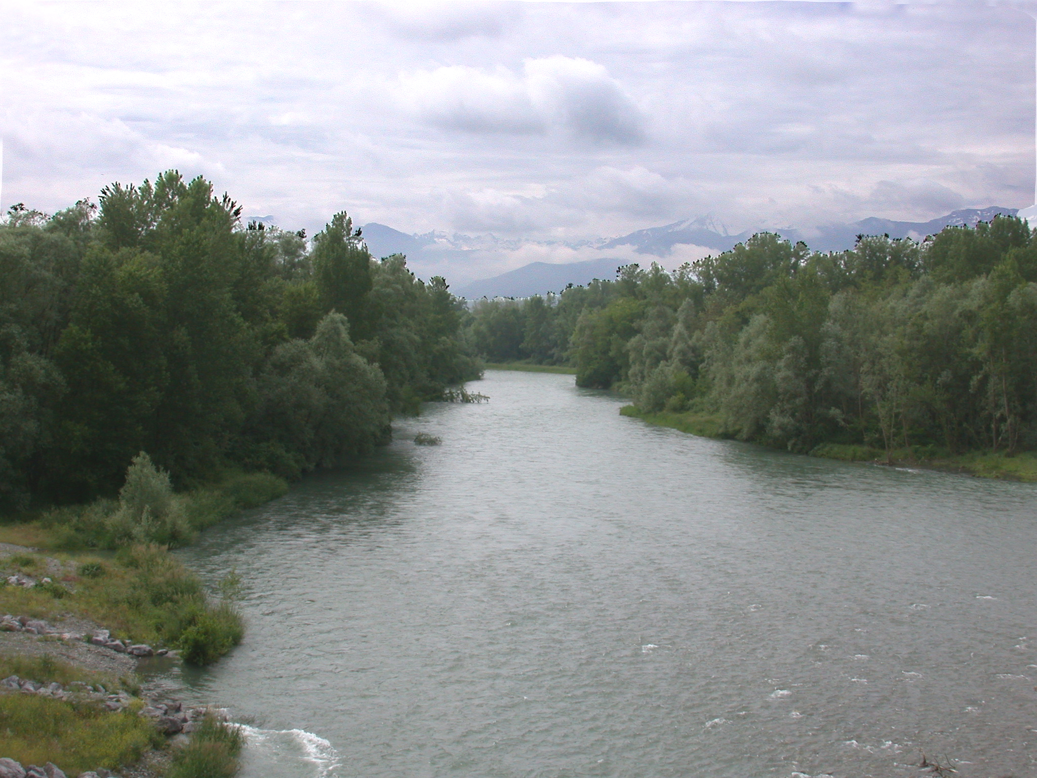 Le gave de Pau et les saligues en amont du pont d'Assat. Photographie prise du haut des pylônes du pont.